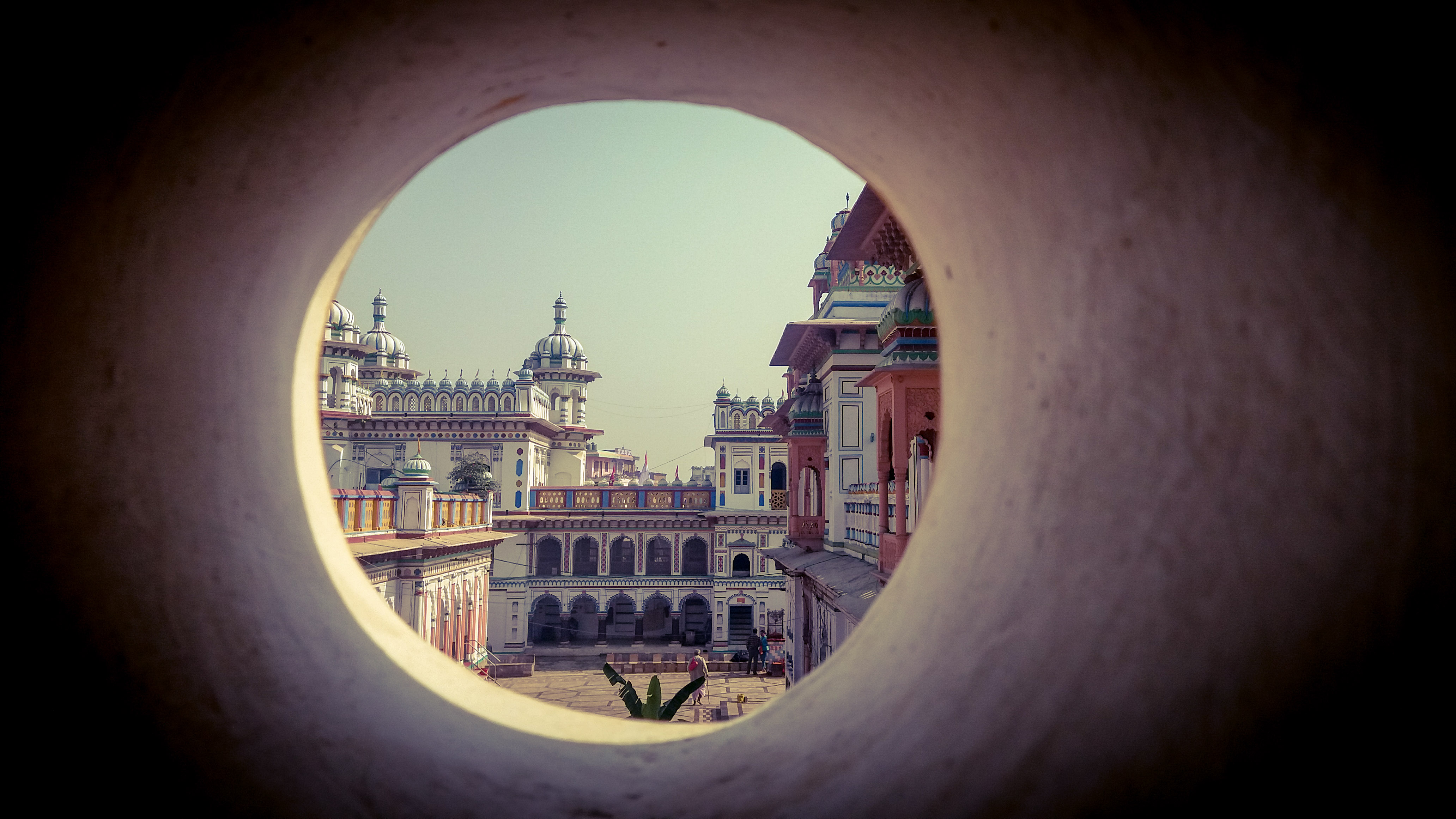 नेपाली: जानकी मन्दिरको पछिल्लो भागको सानो प्वालबाटलिइएको अगाडिको मुख्य द्वारको फोटो